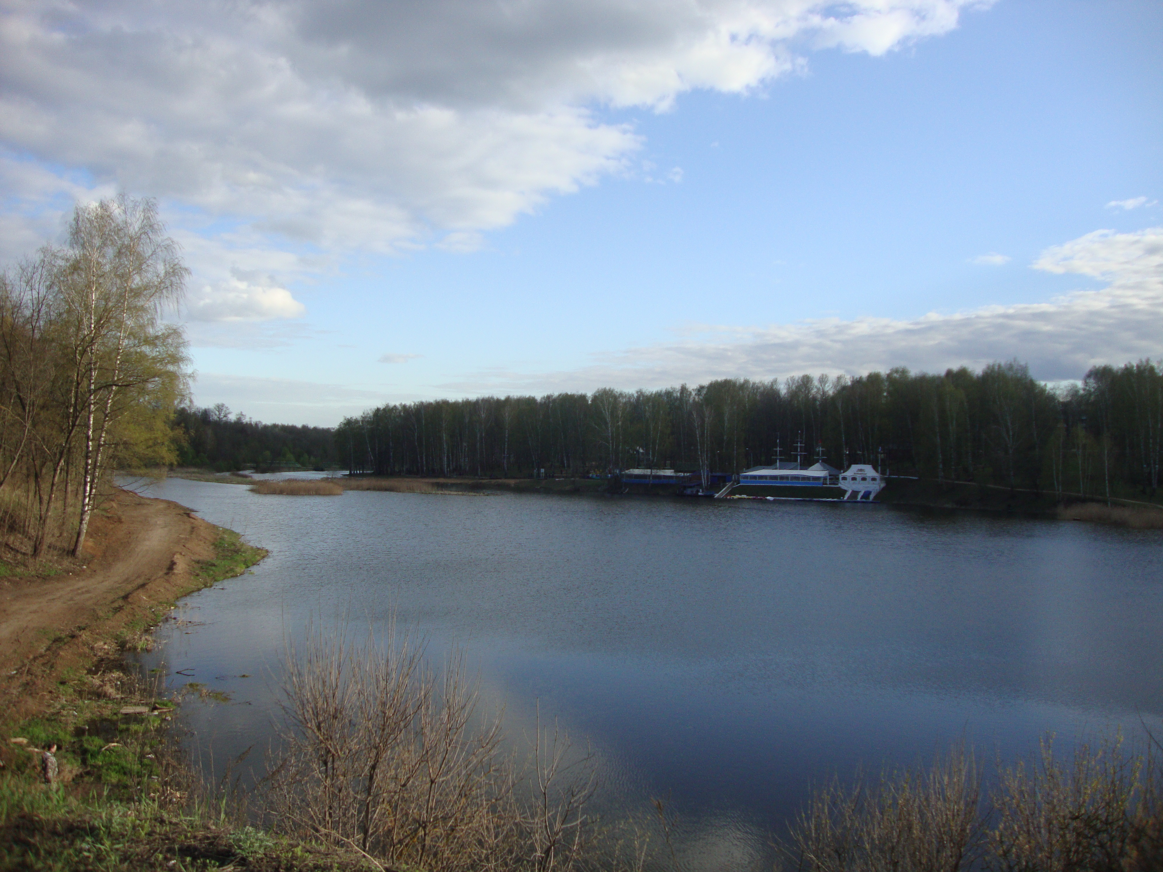 г.Клин This image is related to the protected area of Russia number 5000001